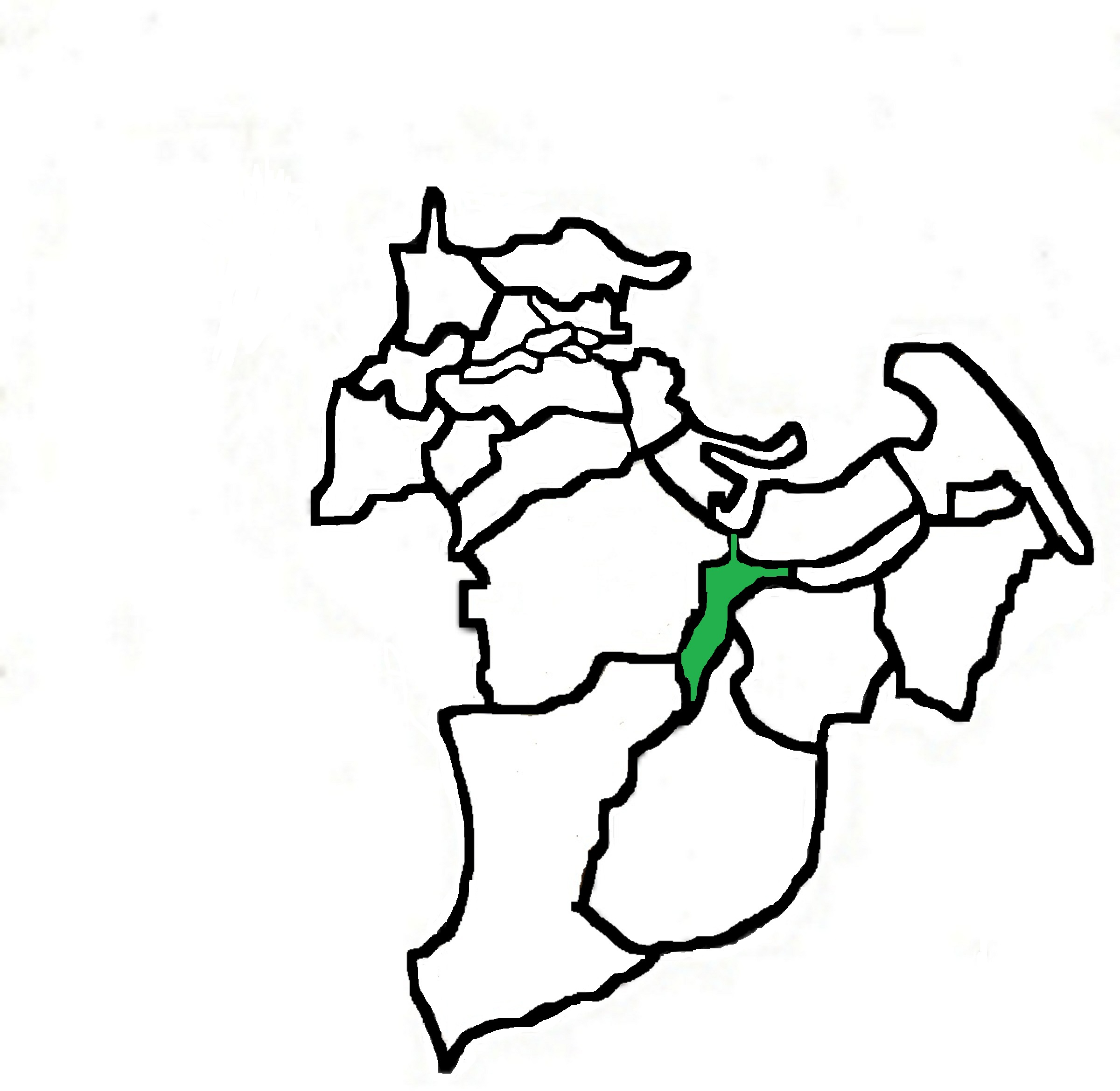 徳島県小松島市赤石町の範囲